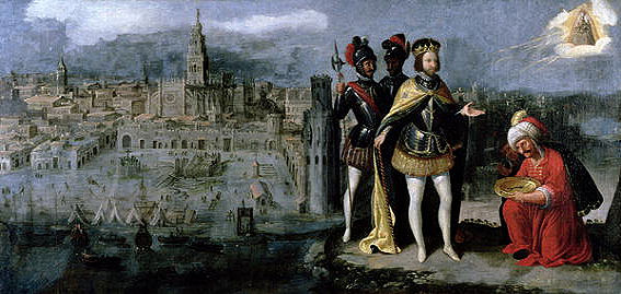 Tableau représentant la capture de Séville par Ferdinand III, peint par Francisco Pacheco